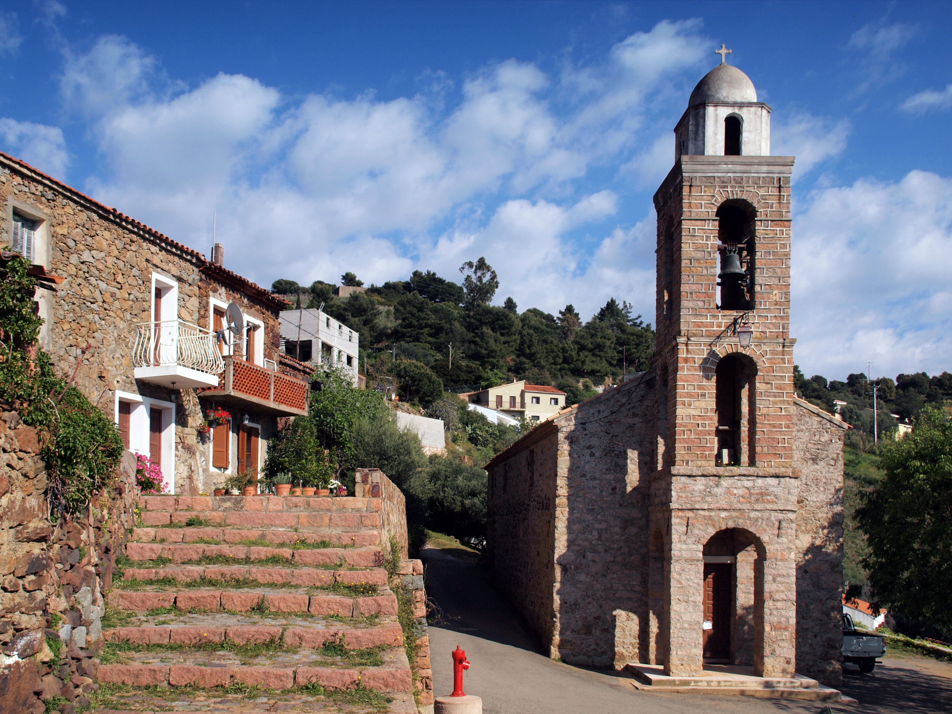 Partinello (Corse) - Église Sant-Antoine de Padoue